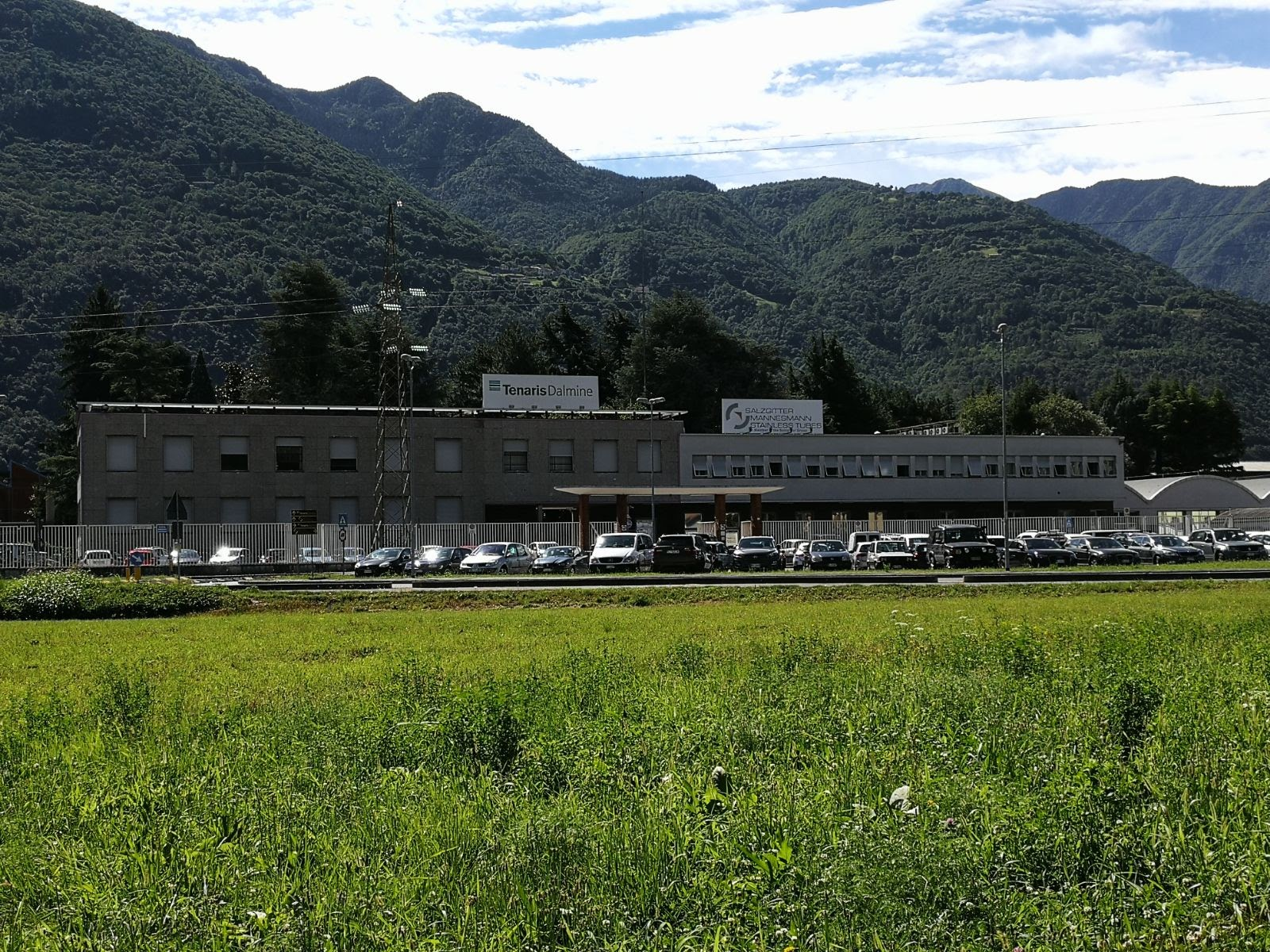 Stabilimento Dalmine presso Piano di Costa Volpino. Scattata da Gianmaria Barone il 25/07/2017